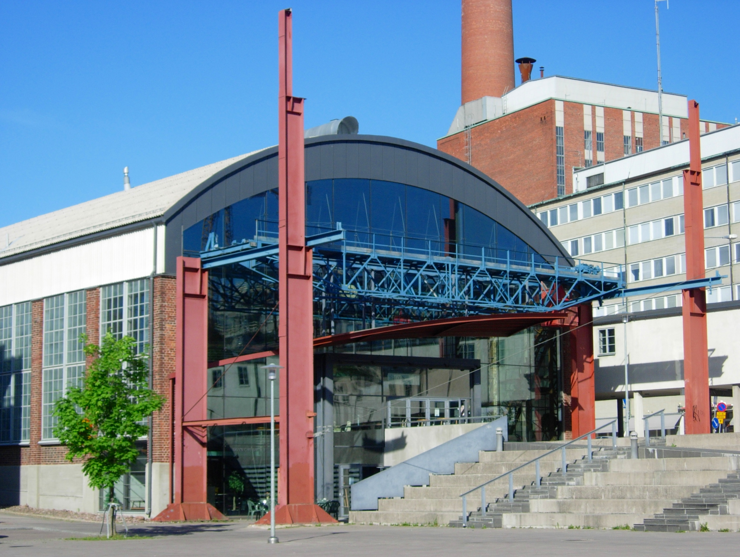 Turun konservatorio. Rakennus on korjattu konservatorion käyttöön vuonna 1994. Aikaisemmin se oli kuului Crichton-Vulcanin telakka-alueeseen. Taustalla näkyy myös Turku Energian laitos ja pieni pätkä köysitehdasta.[1]